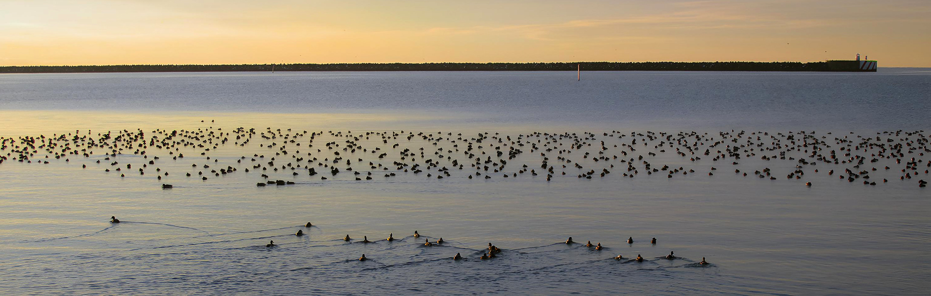 Under vintern samlas ofta Viggar i stora flockar. 2000 Viggar rastar i Ystads hamn 08:30 16 jan 2016.